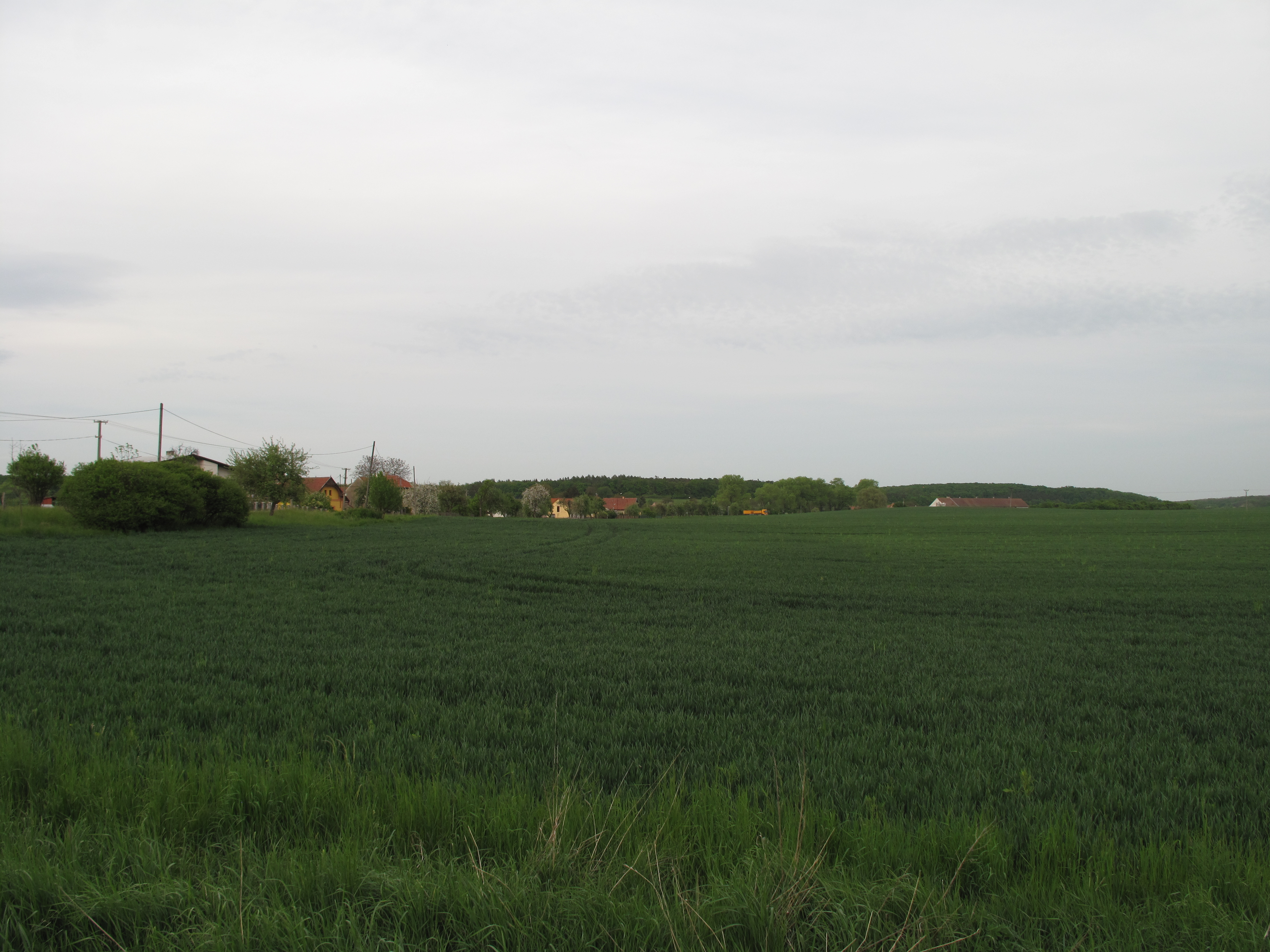 Pole ve Viničné Lhotě. Okres Nymburk, Česká republika.